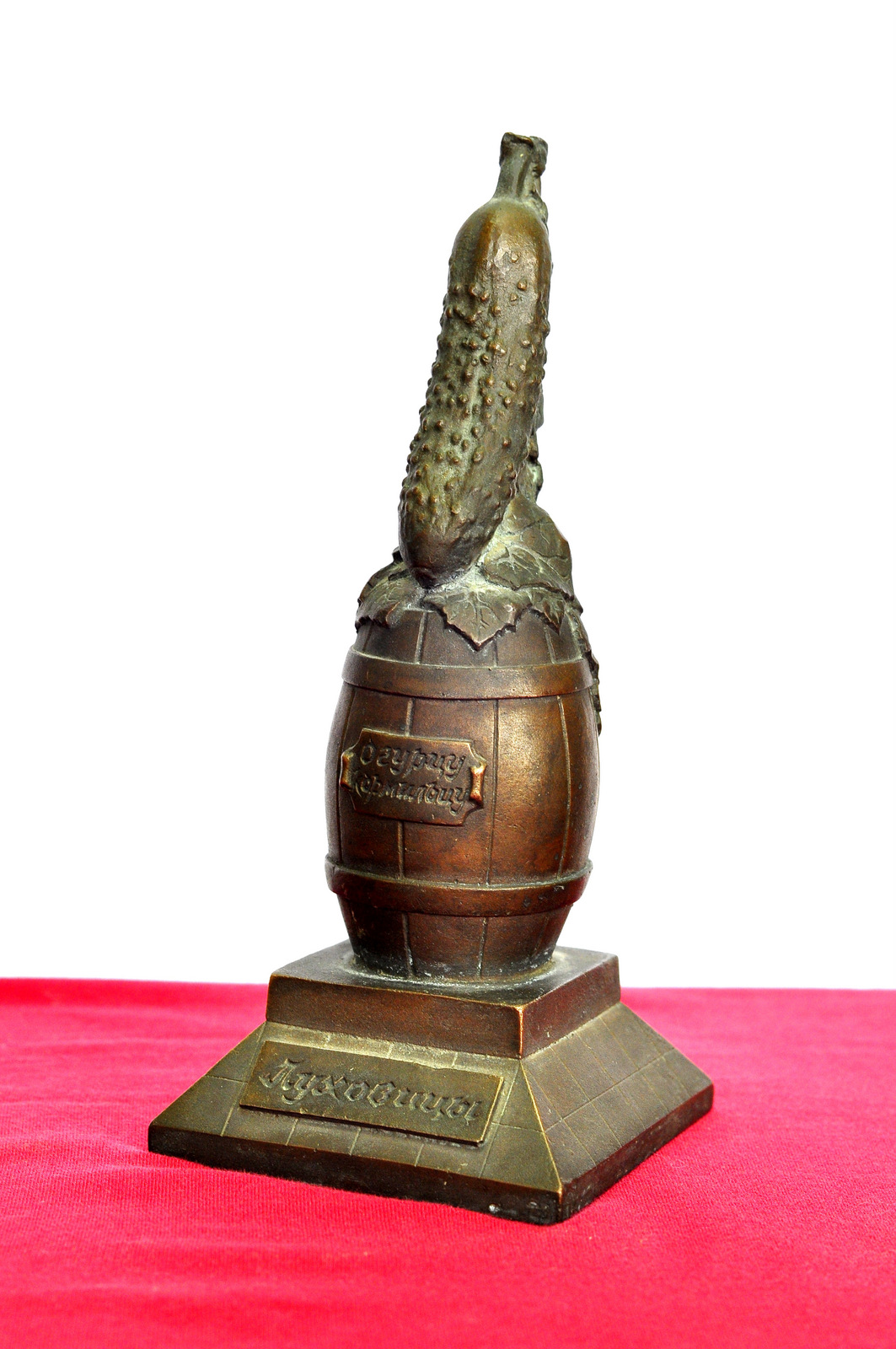 Бронзовый эскиз памятника огурцу